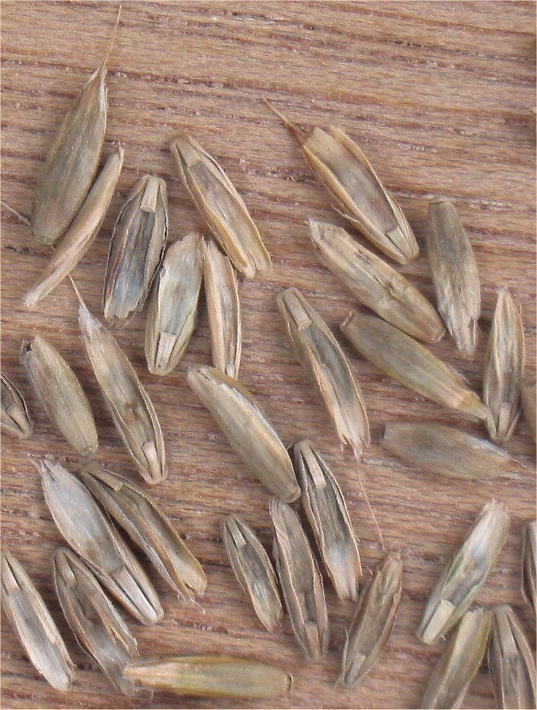 Italiaans raaigras vruchten) Lolium multiflorum fruits (Italian ryegrass seeds